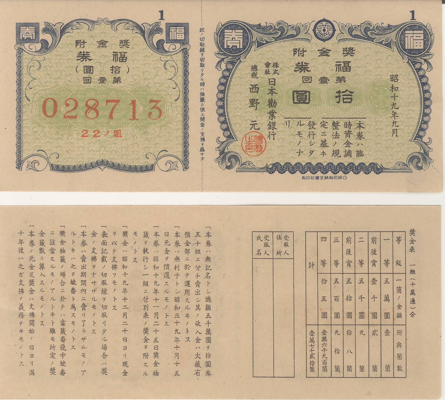 投稿者の自宅に保管してあったもの。